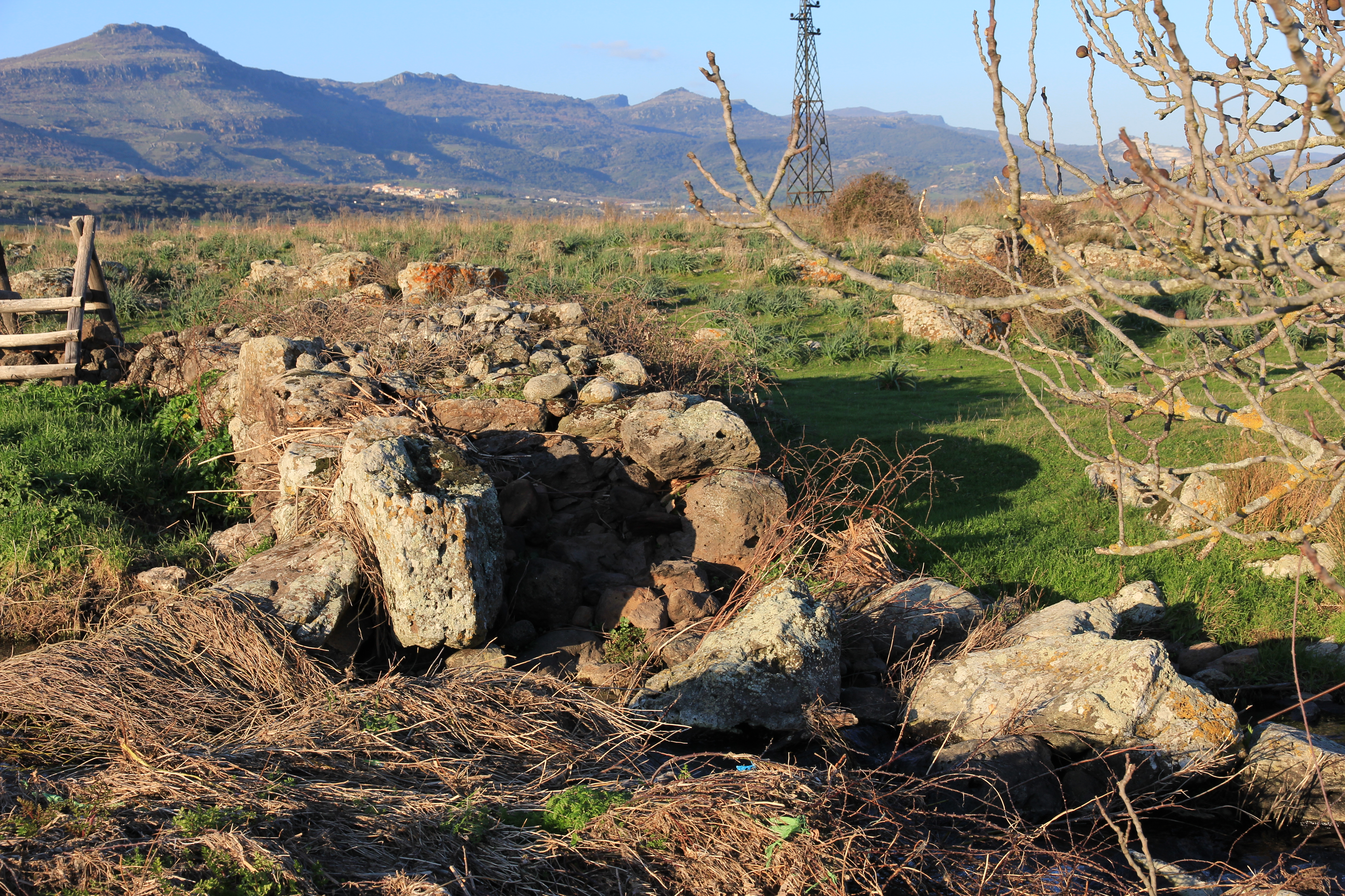 Birori - Ponte antico (forse nuragico)